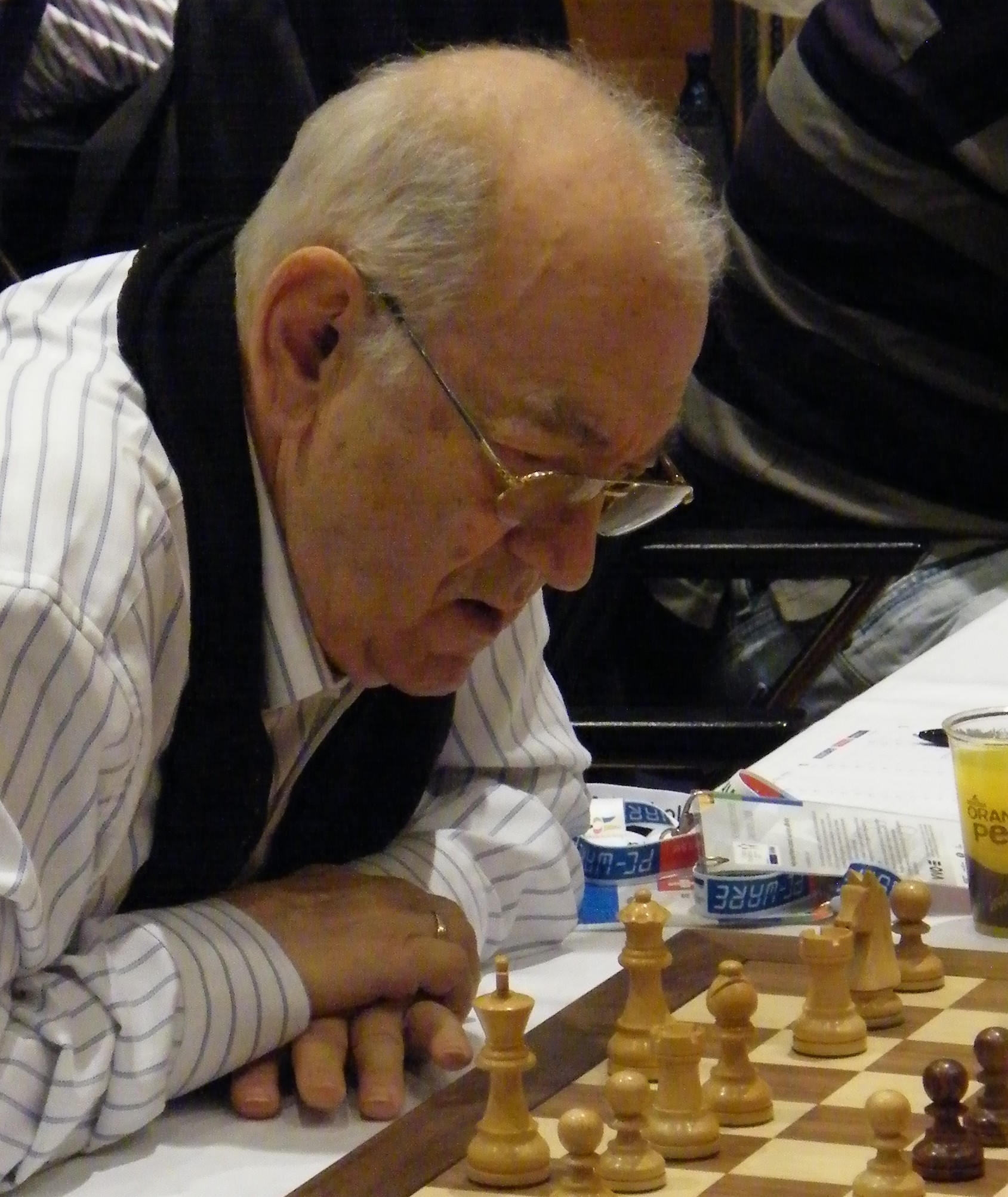 GM Viktor Kortschnoi bei der Schacholympiade 2008 in Dresden